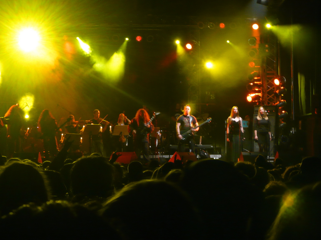 Haggard band 2 W:O:A